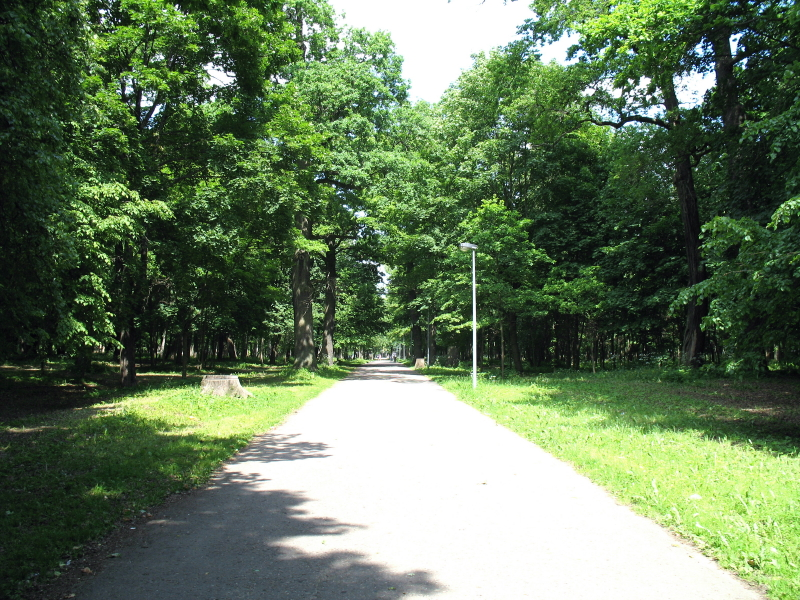 Ąžuolyno parkas Žaliakalnyje, Kaunas.